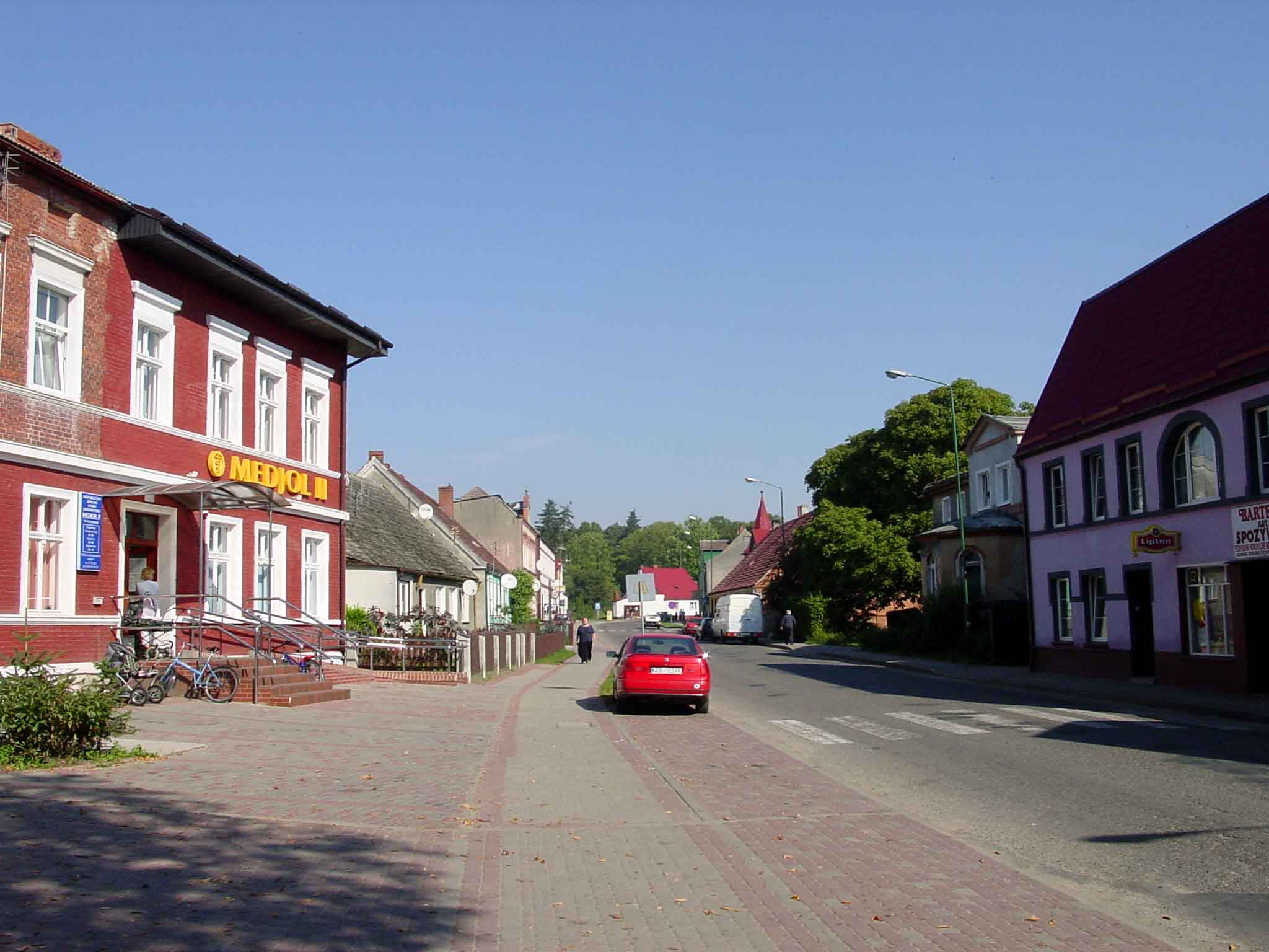 Tychowo, widok od strony kościoła na głowną ulicę w Tychowie; autor zdjęcia Kluka; 02.02.2000r.